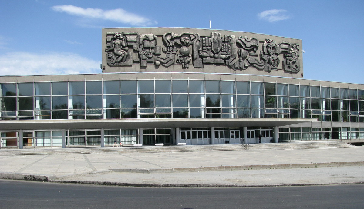 Дворец молодёжи в Екатеринбурге